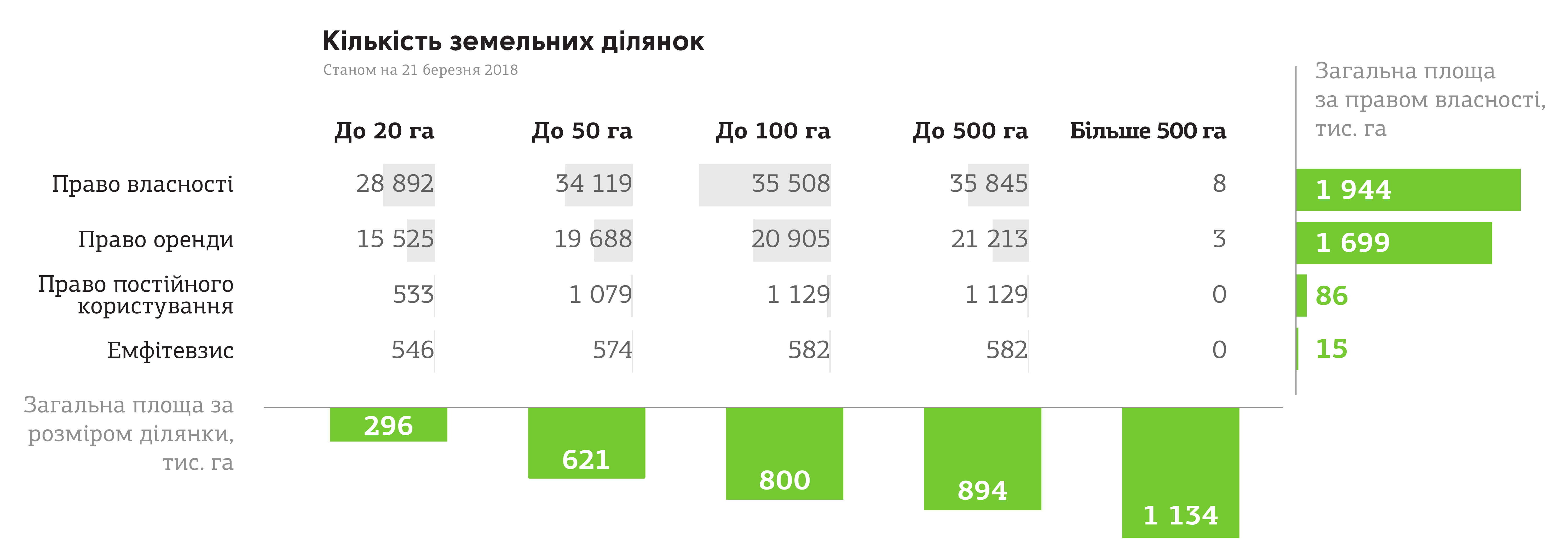 Кількість земельних ділянок в Україні станом на 21 березня 2018. За правом власності та за розміром земельної ділянки